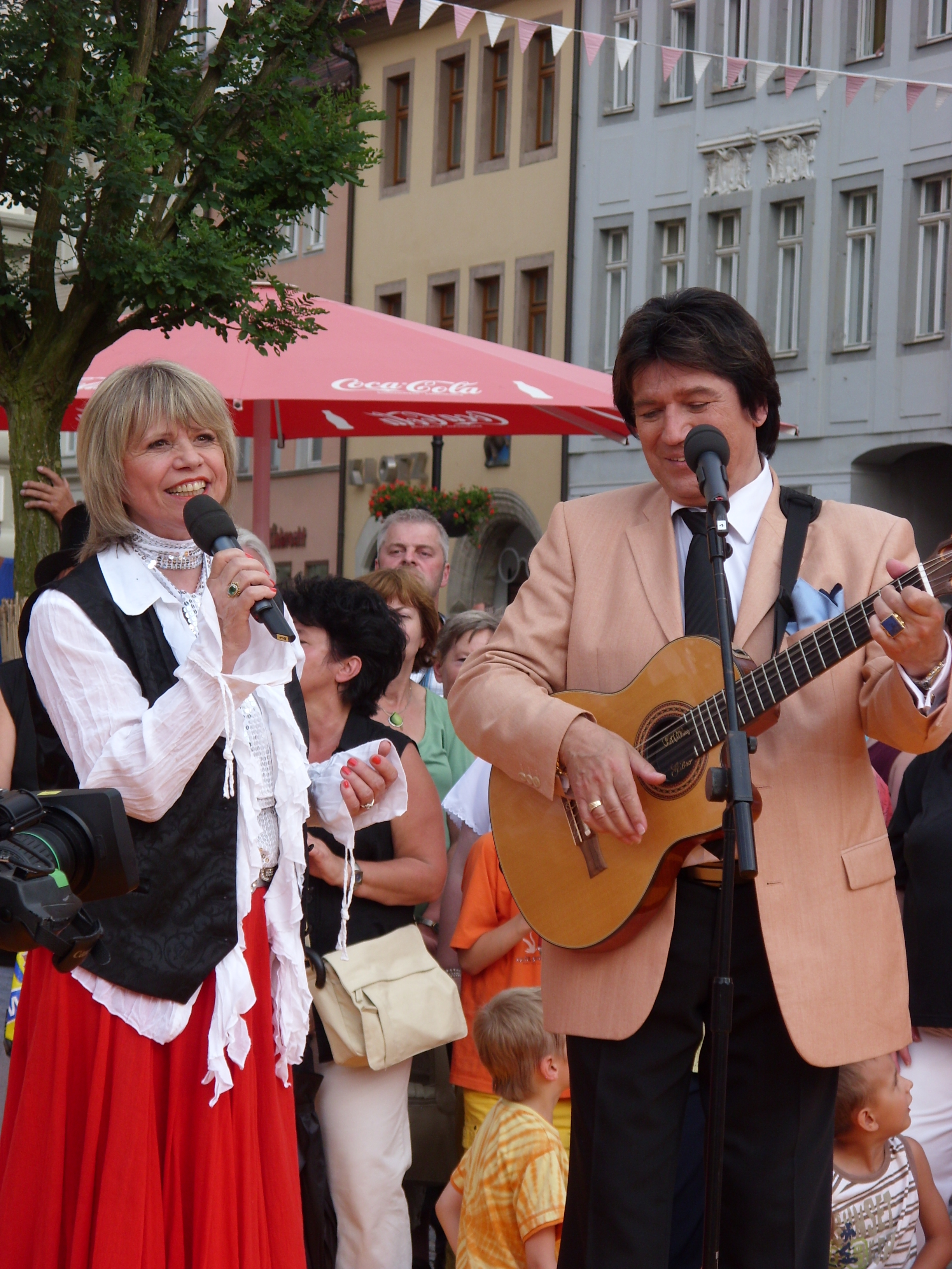 Hauff & Henkler